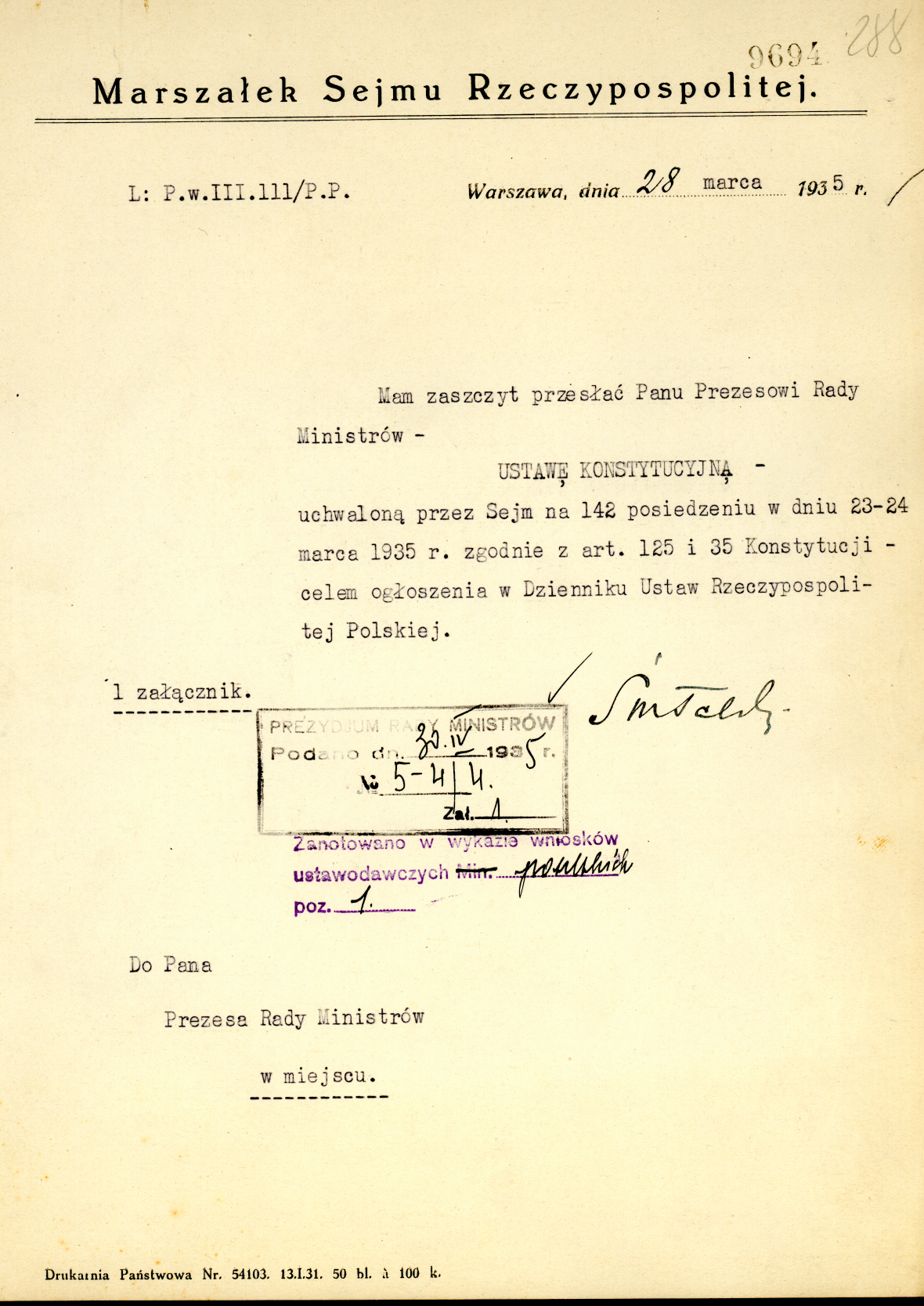 Pismo Marszałka Sejmu do Premiera przekazujące uchwaloną przez Sejm konstytucję